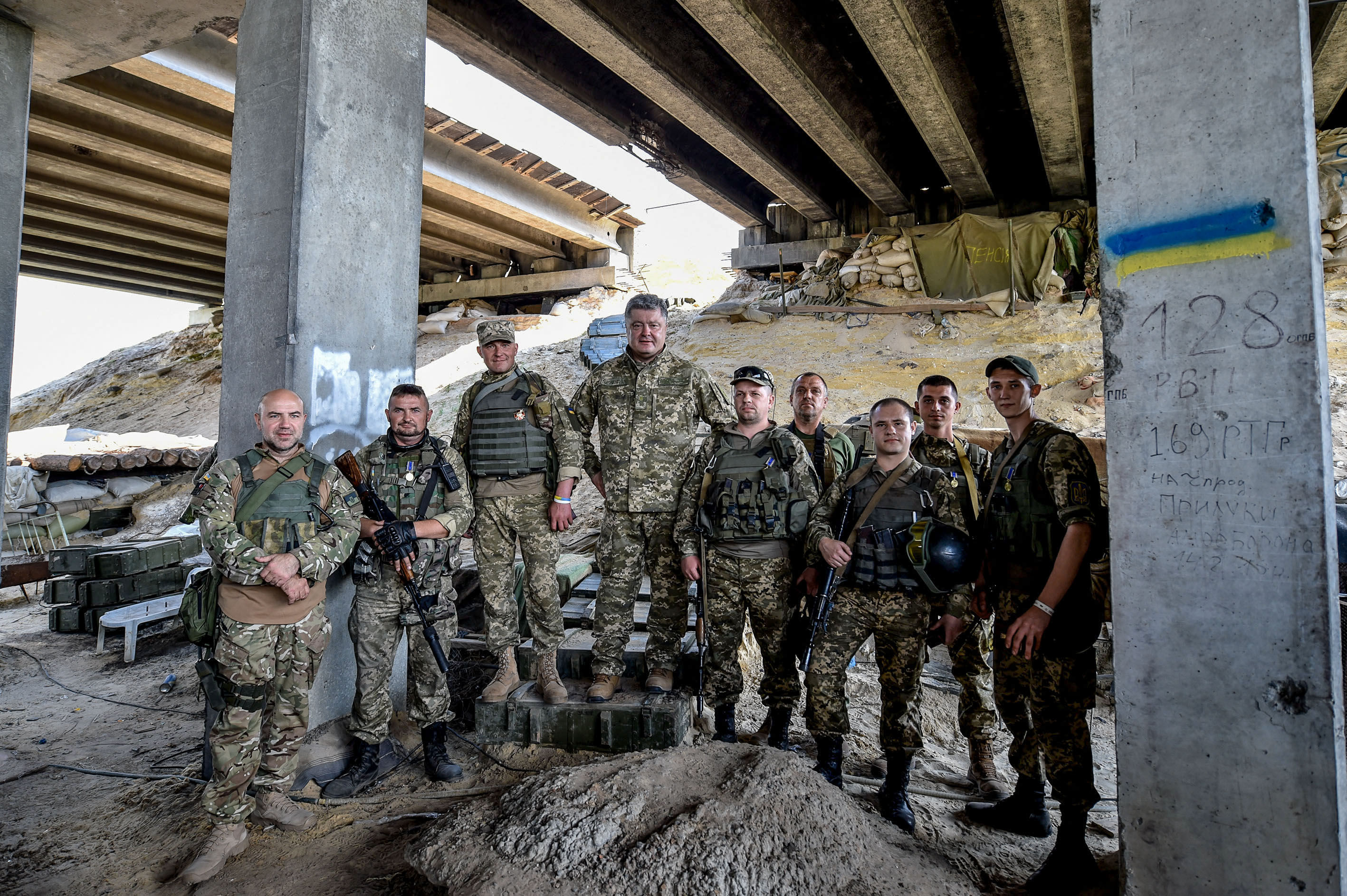 Президент проінспектував опорні пунтки на передовій у Донецькій області.